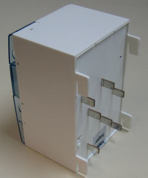 EHZ Rückseite